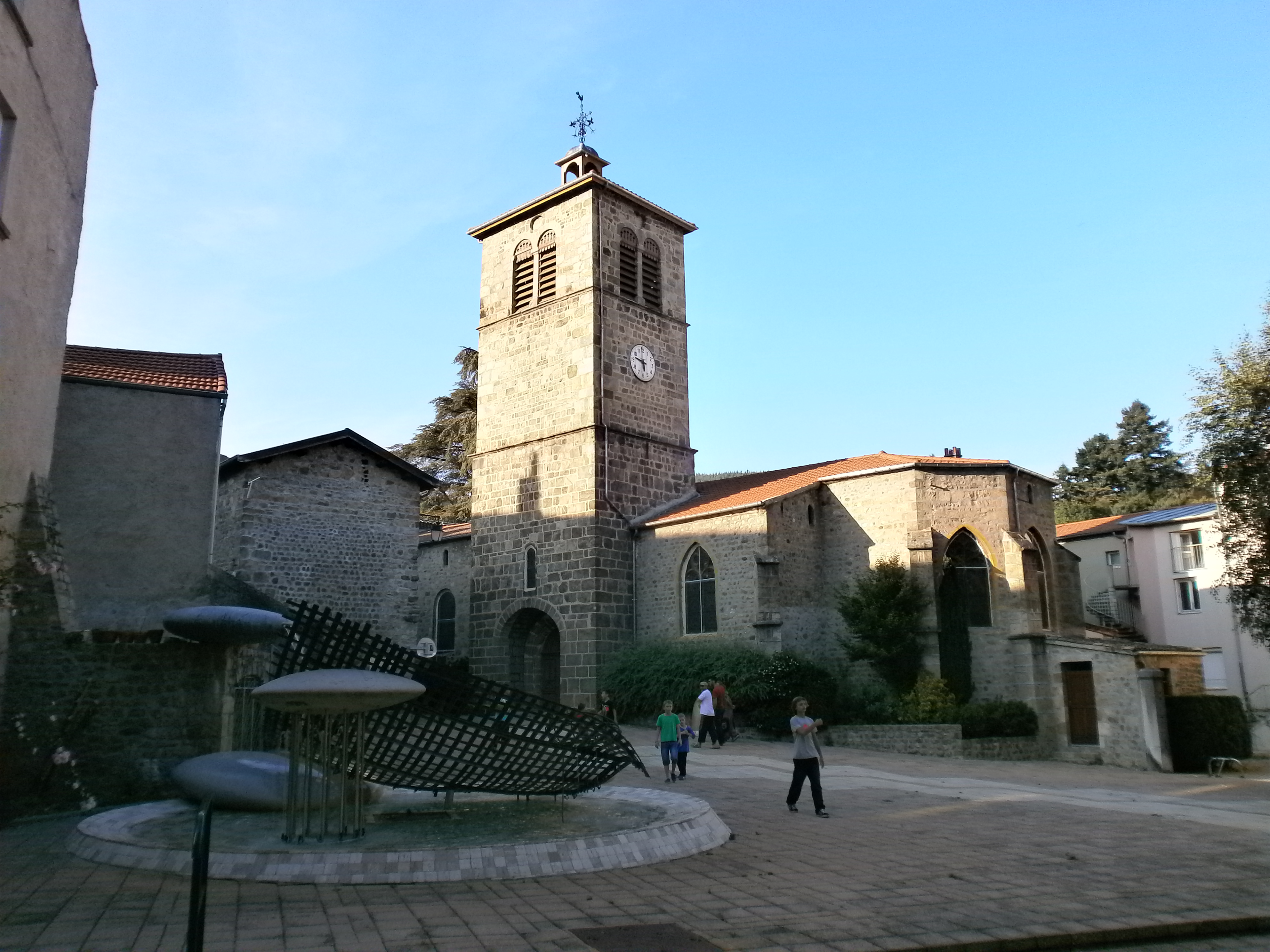 Saint-Julien-Molin-Molette, église et espace aux six fontaines